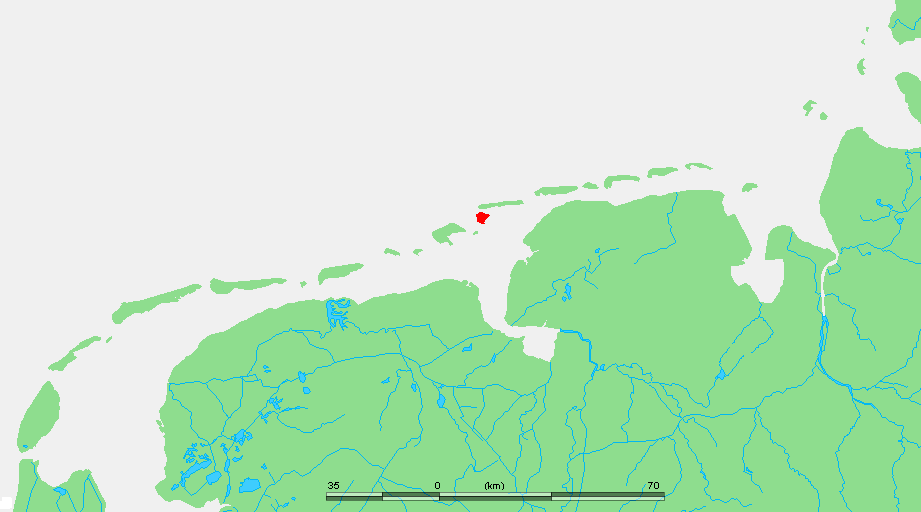 Wadden - Memmert